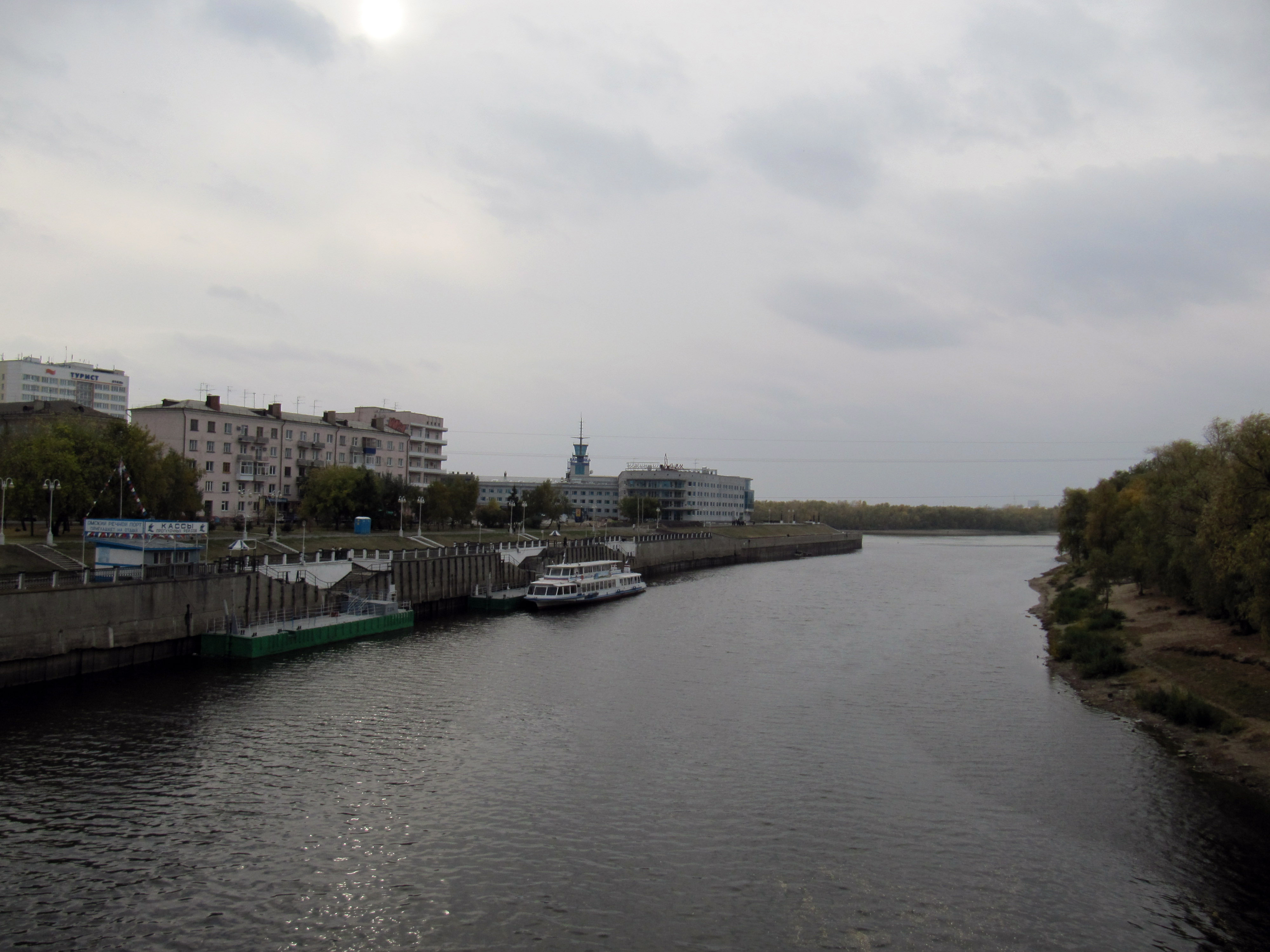 Omsk, Om river